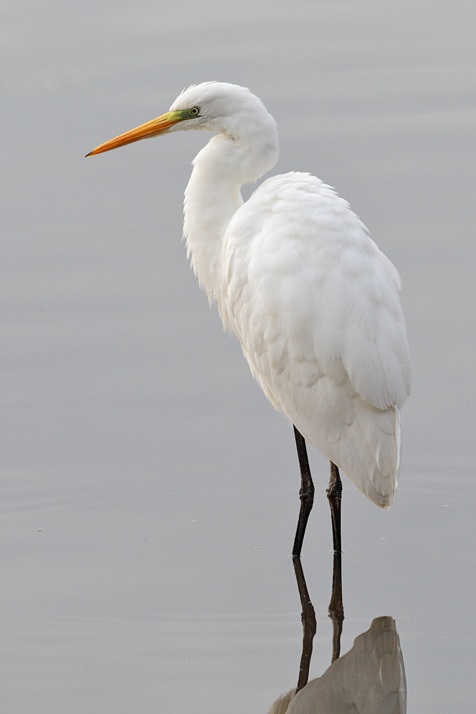 Silberreiher direkt vor der Beobachtungshütte